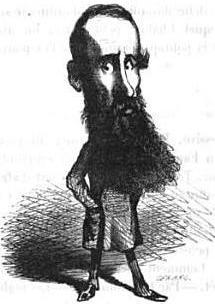 Caricature de Jean Louis Greppo (1810-1888), par Cham.